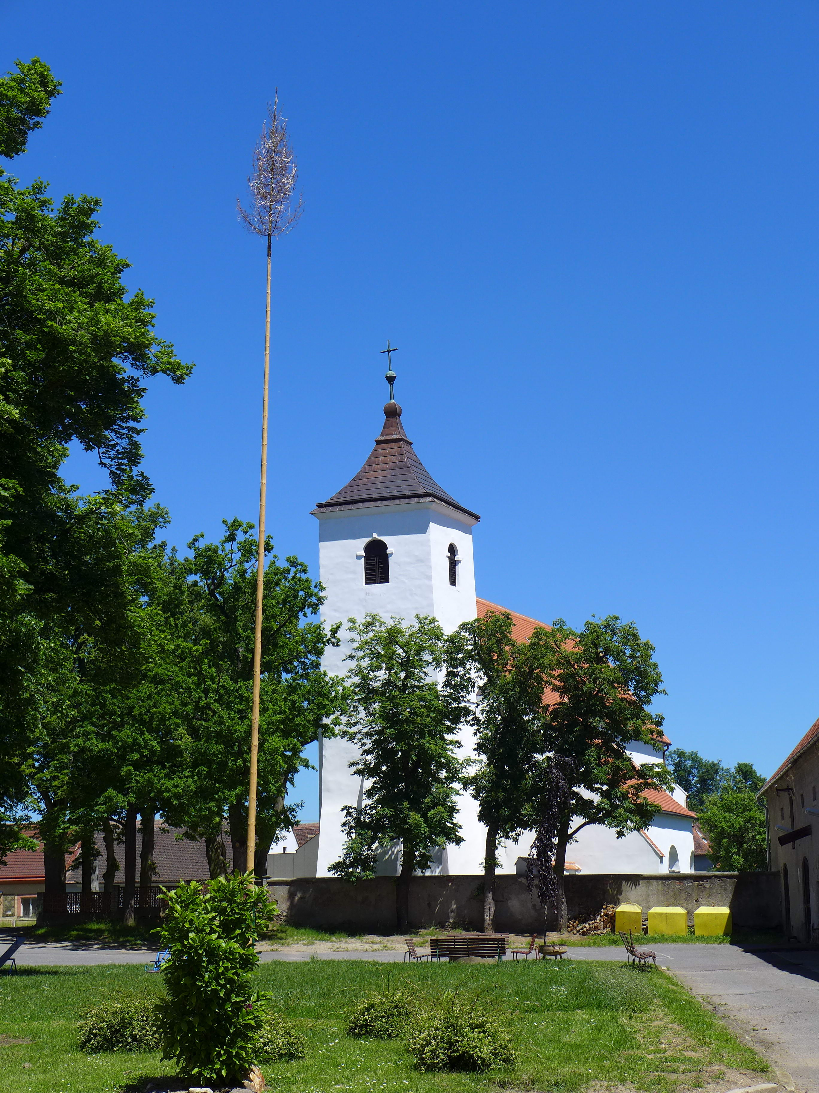 Kostel Zvěstování P. Marie (Budeč), Budeč